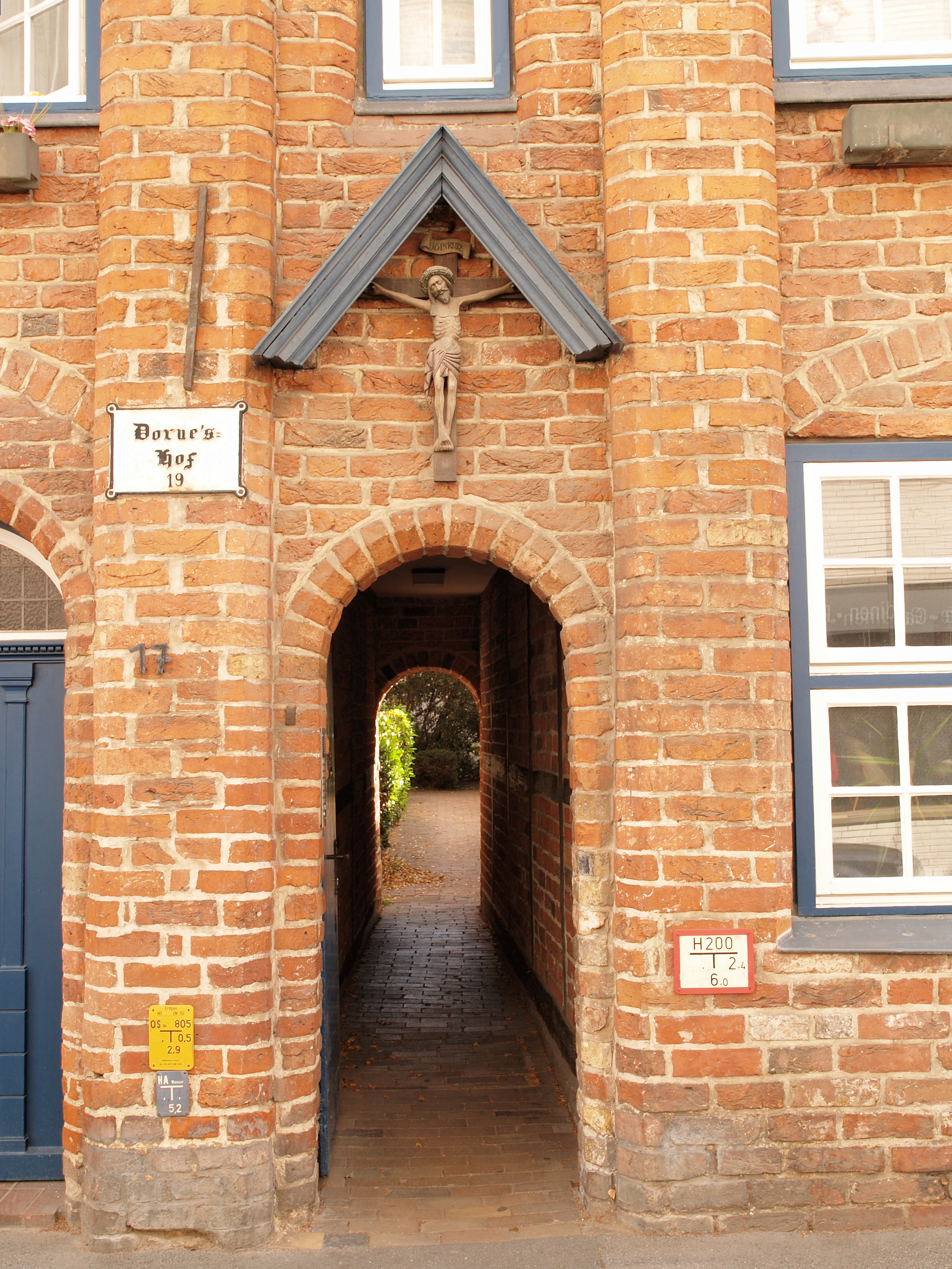 Dornes Hof, einer der Gänge in Lübeck, Schlumacherstraße 17